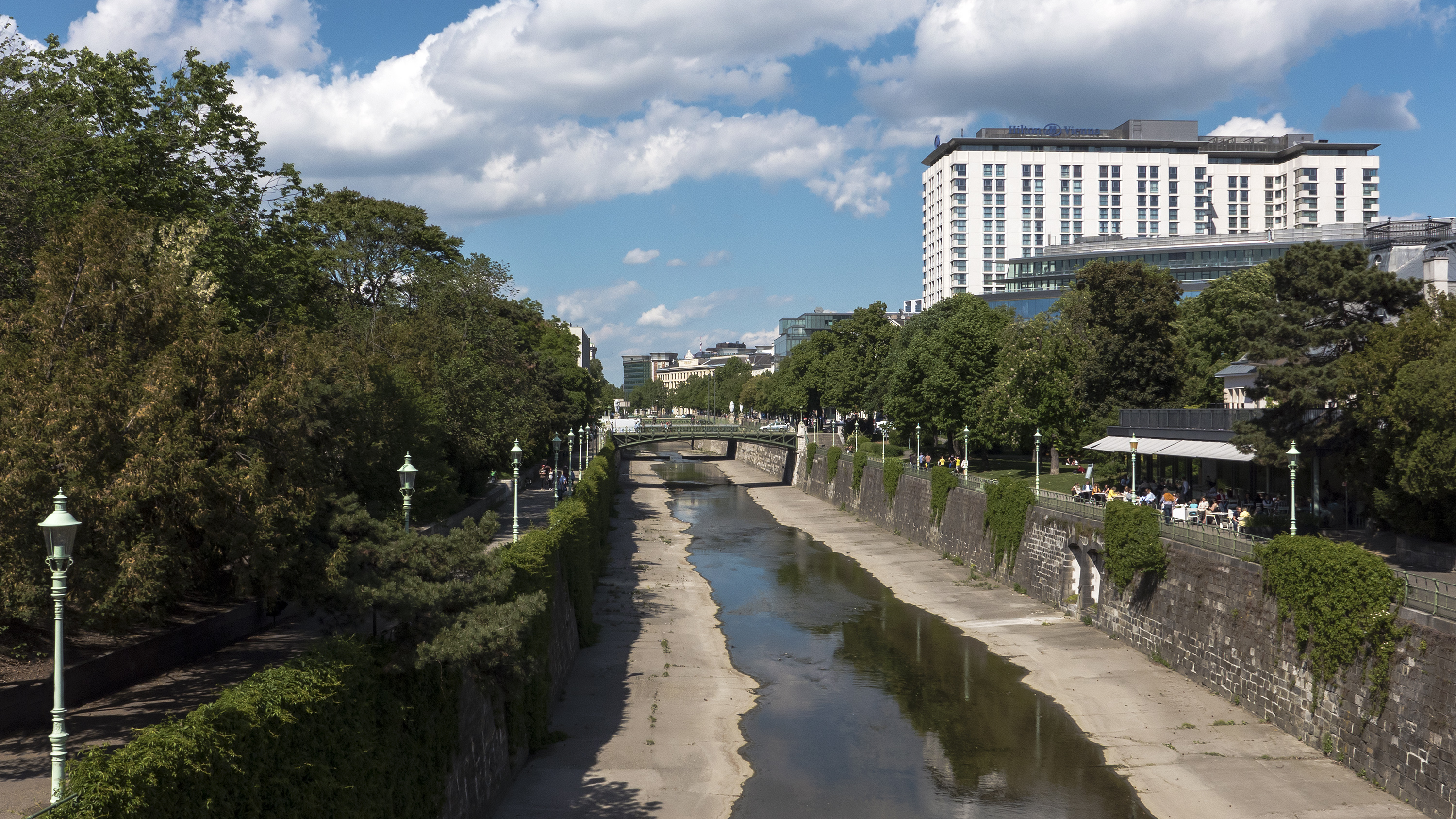 Der Wienfluss im Stadtpark in Wien 1